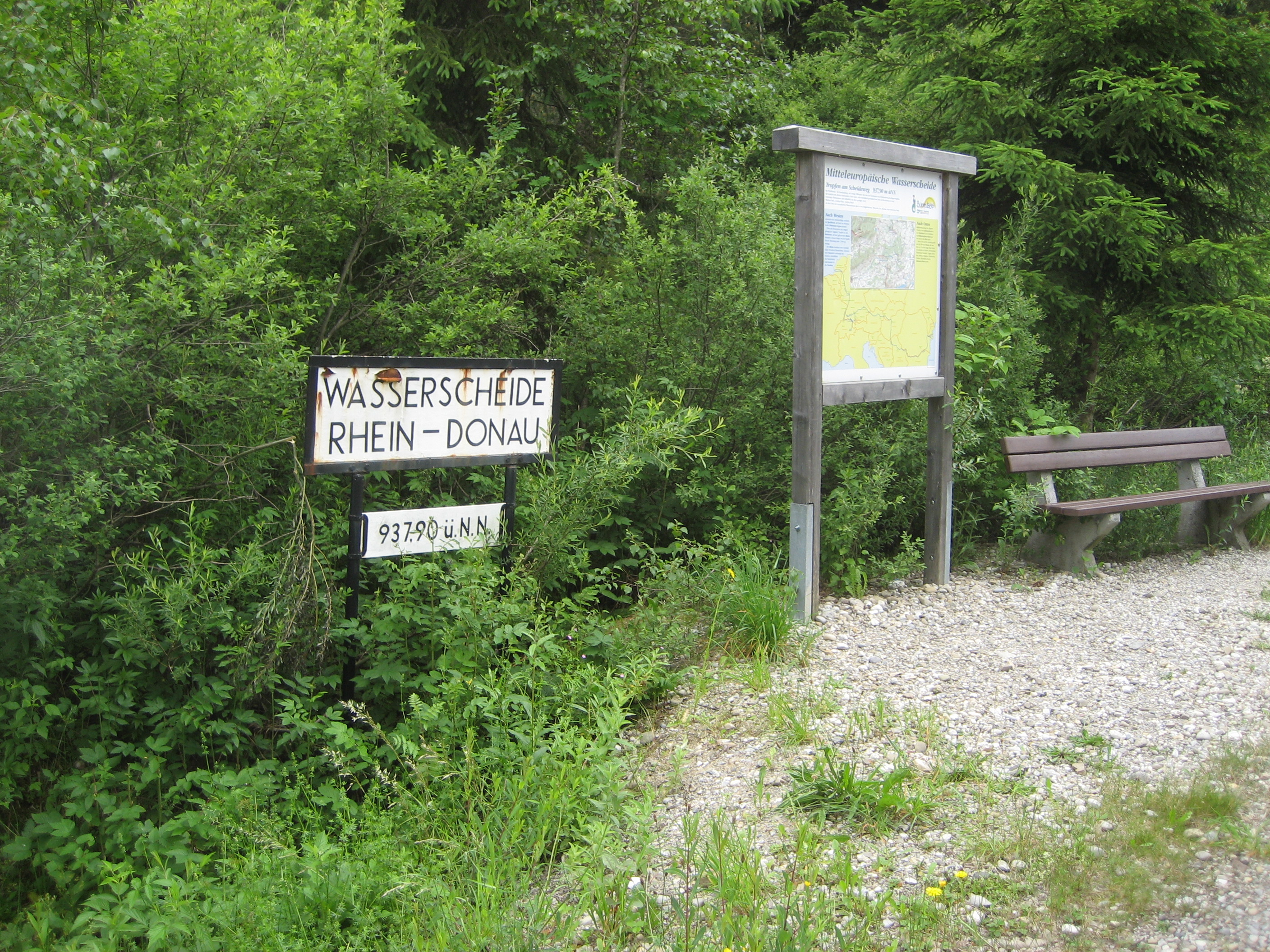 Rhein-Donau Wasserscheide, zugleich höchster Punkt der Bahntrasse